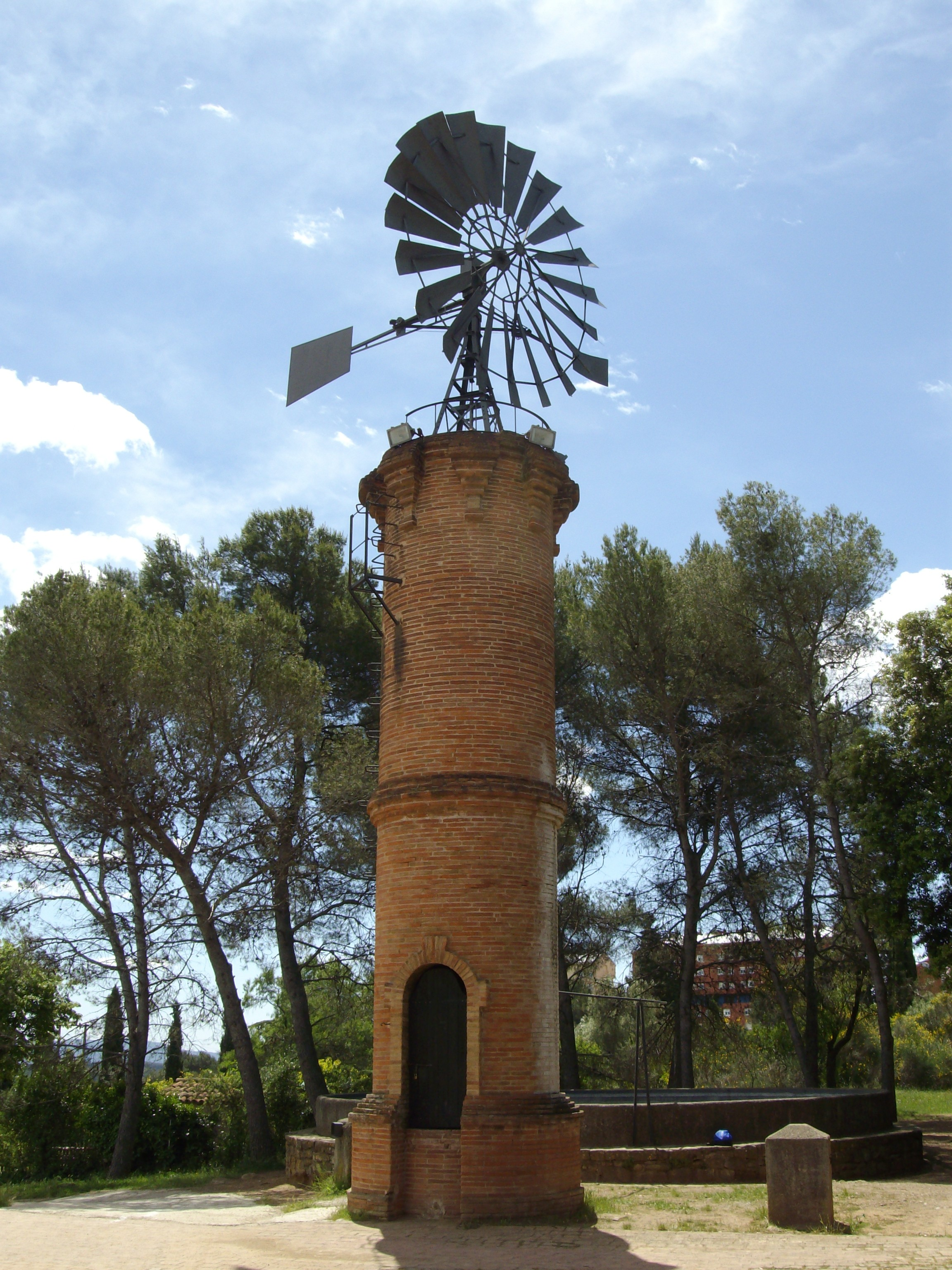 Molino de extracción de agua de la masía de Can Deu. Sabadell, Barcelona (España).